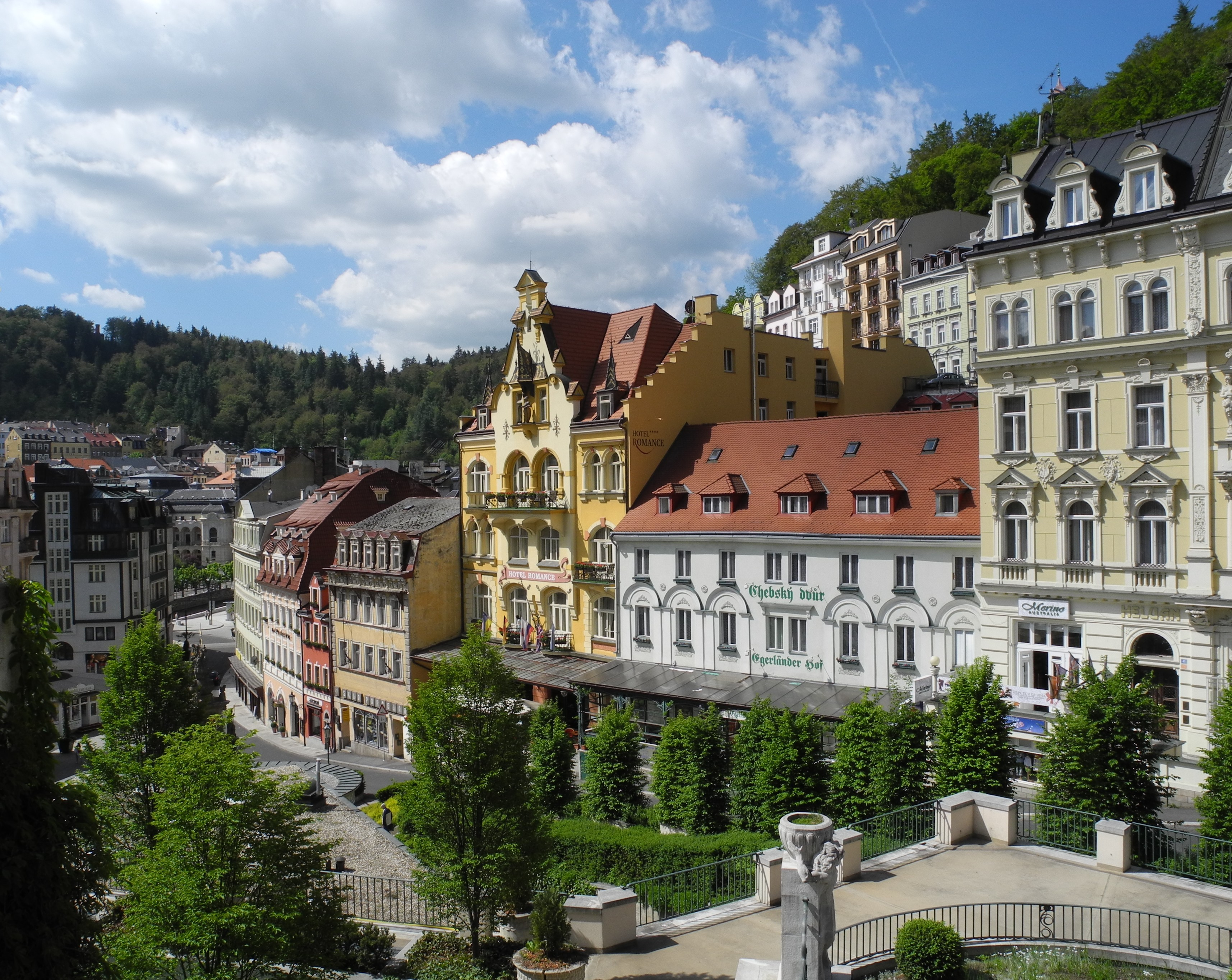 Karlovy Vary(Karlsbad)-Kurgebiet